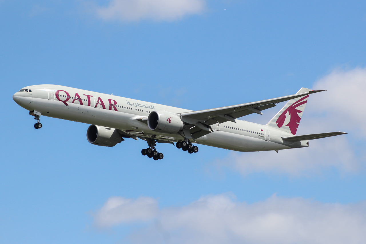 A7-BAI Boeing 777 Qatar